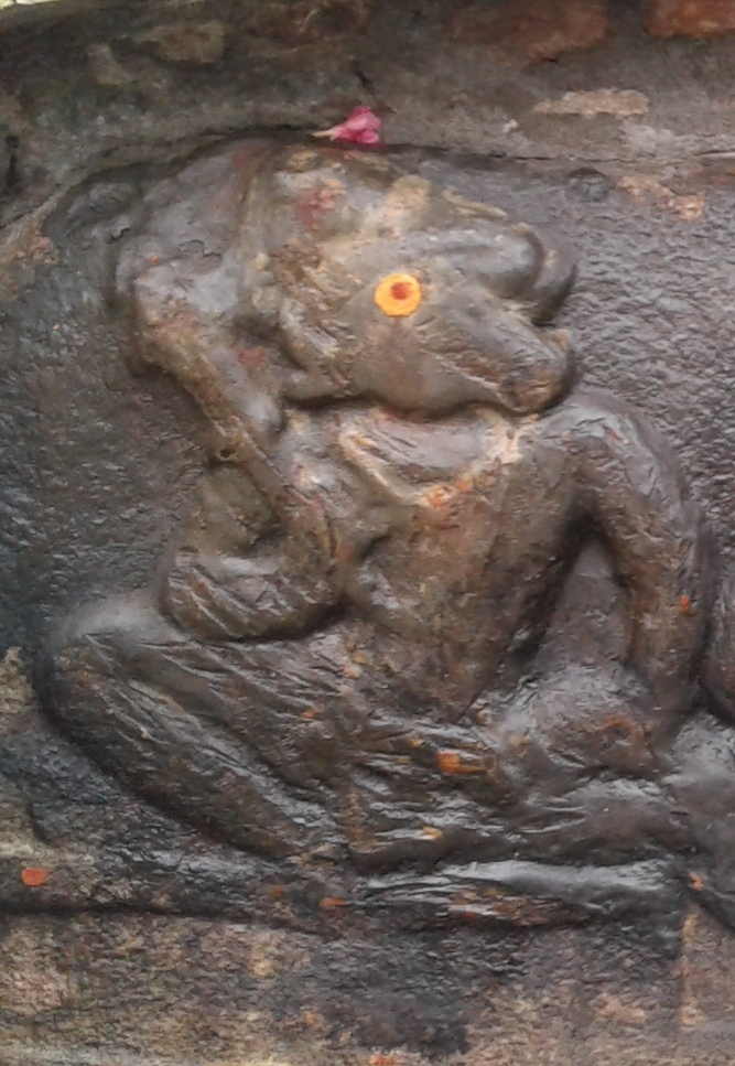 குளிகன் - சனீசுவரன் தவ்வை ஆகியோரின் மகன். எருமைத் தலையுடன் இருப்பார்.